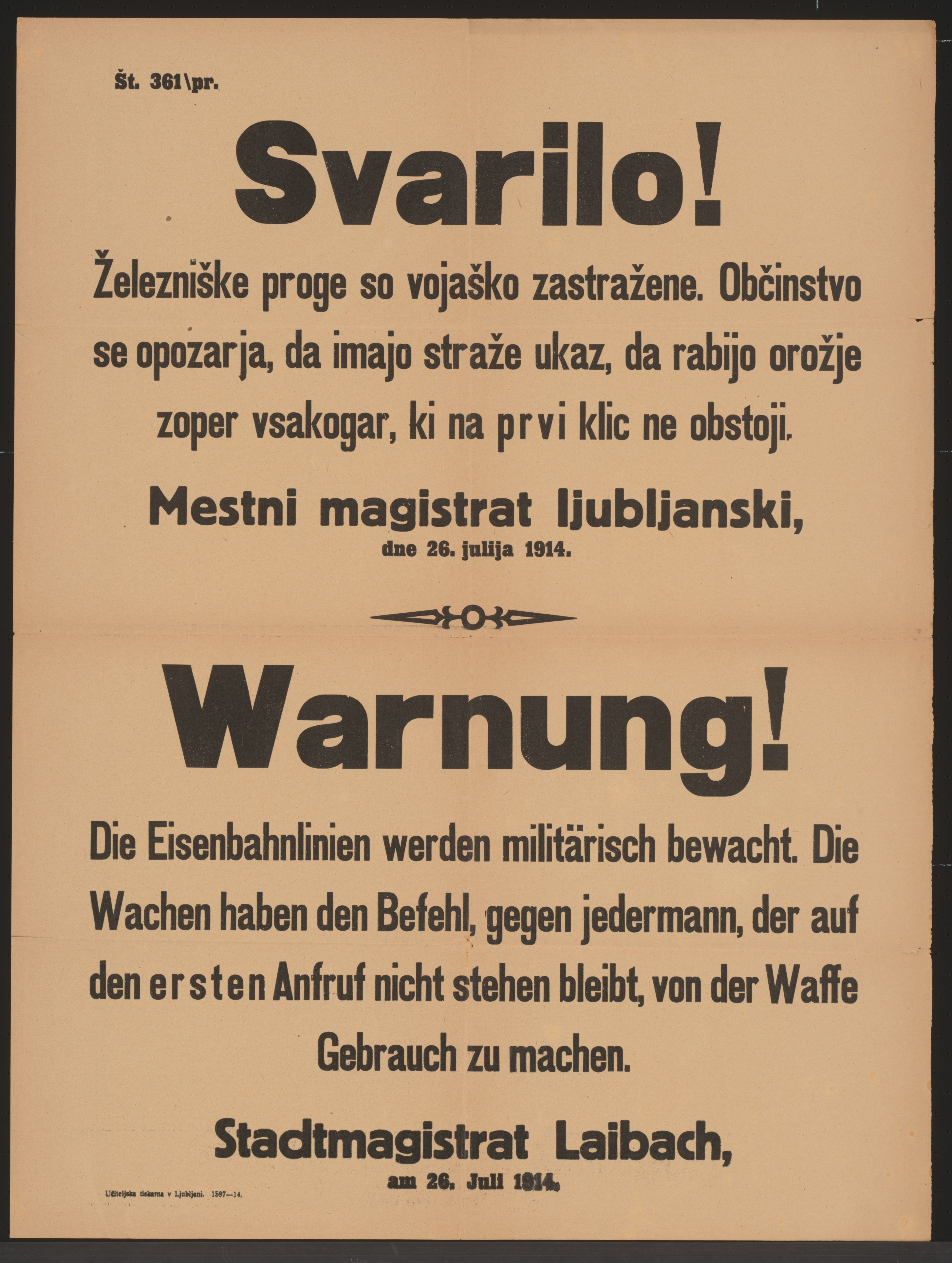 Überwachung der Eisenbahnlinien - Warnung - Laibach - Mehrsprachiges Plakat.